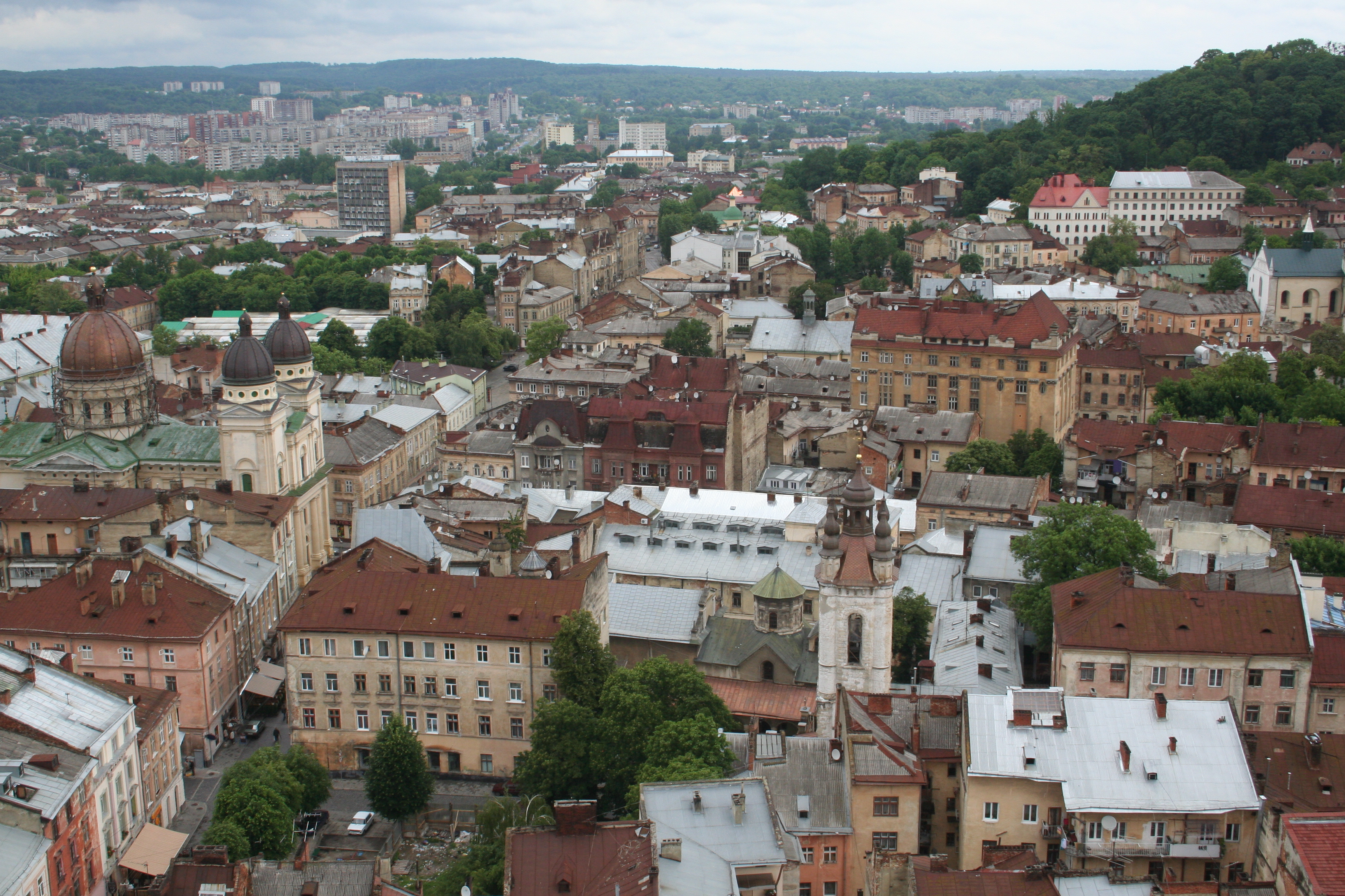 Lemberg Stadtpanorama